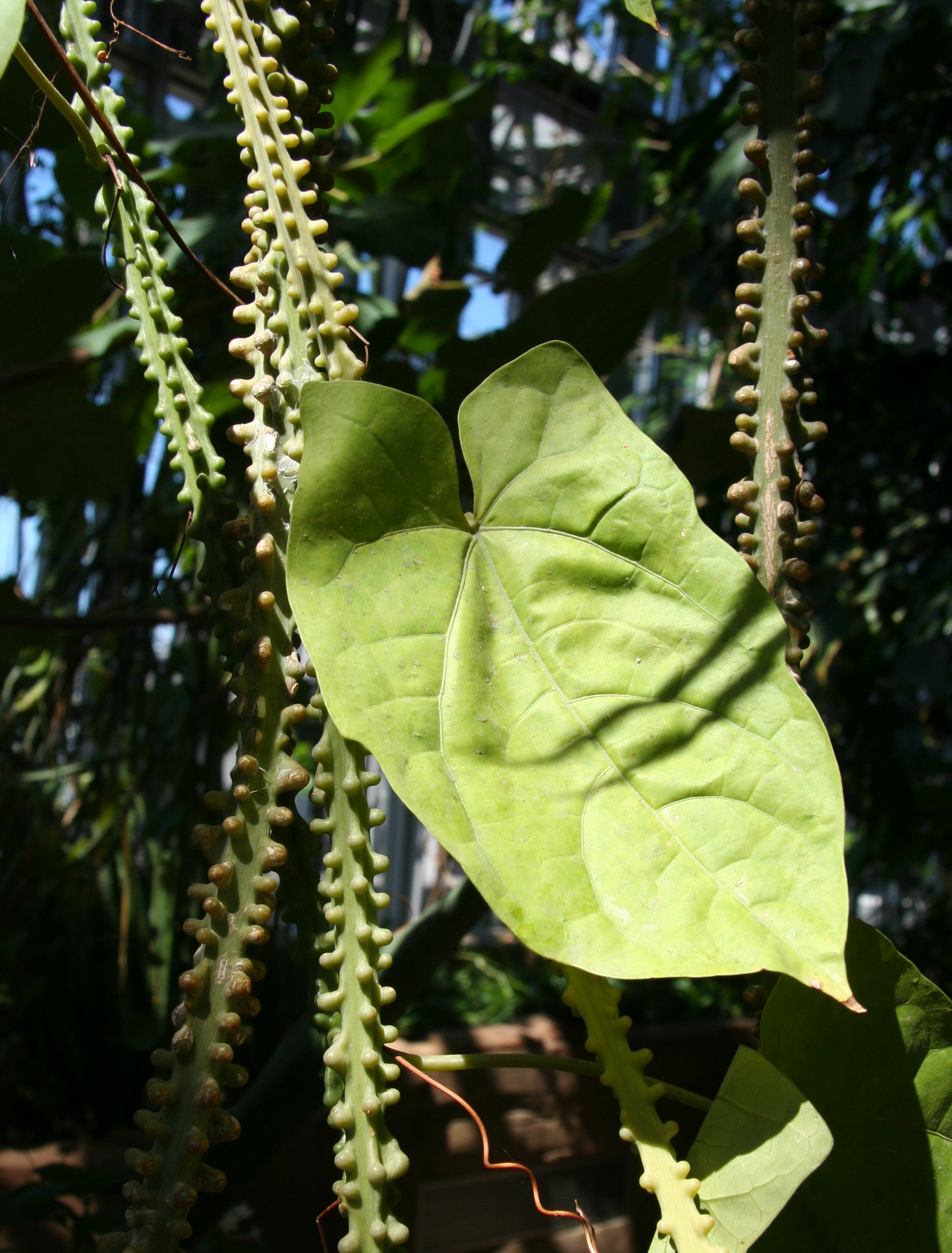 Adenia lobata im Botanischen Garten Berlin